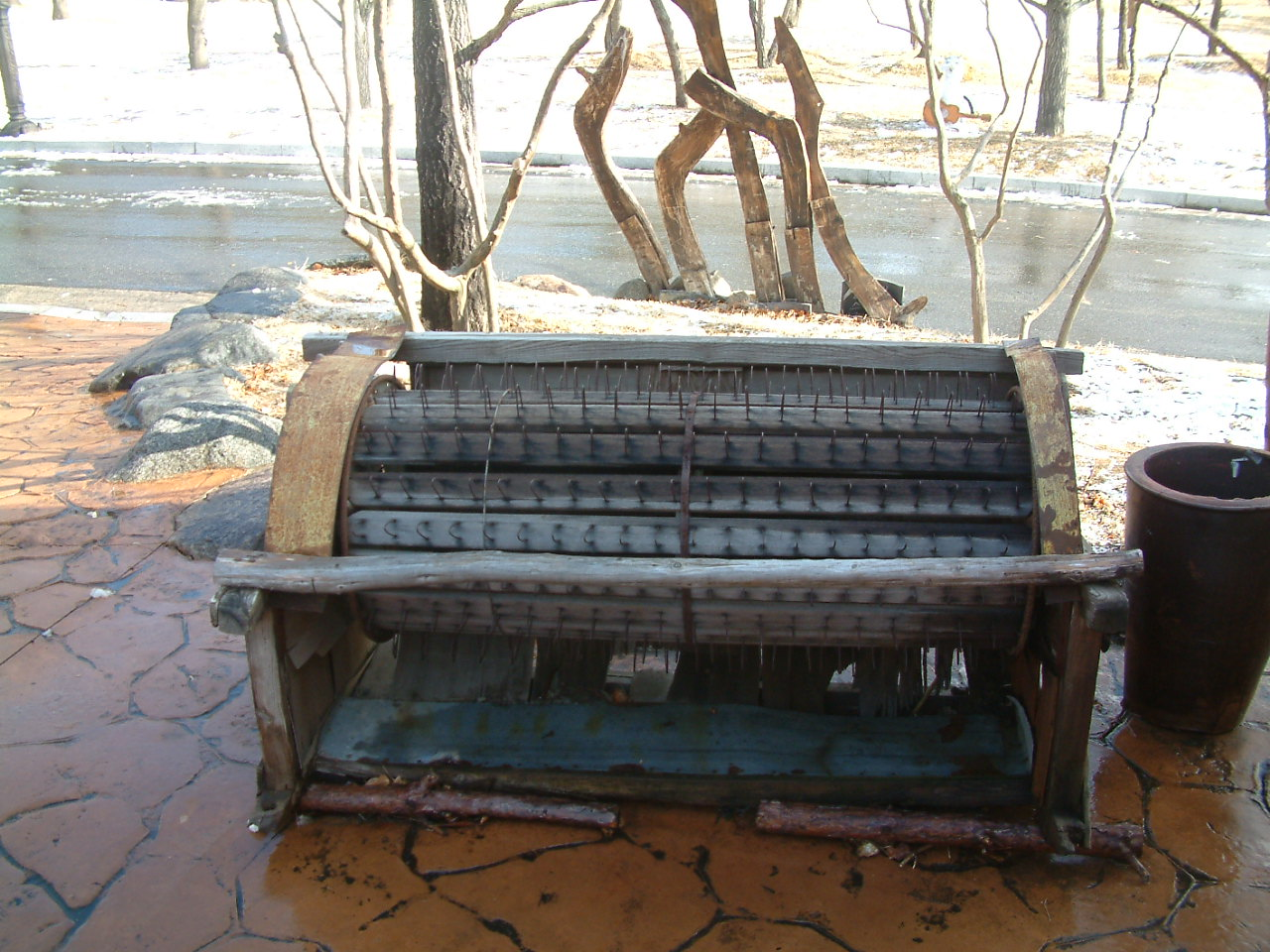 일제시대 - 1970년대 초반의 탈곡기(Grain Harvest Machine)